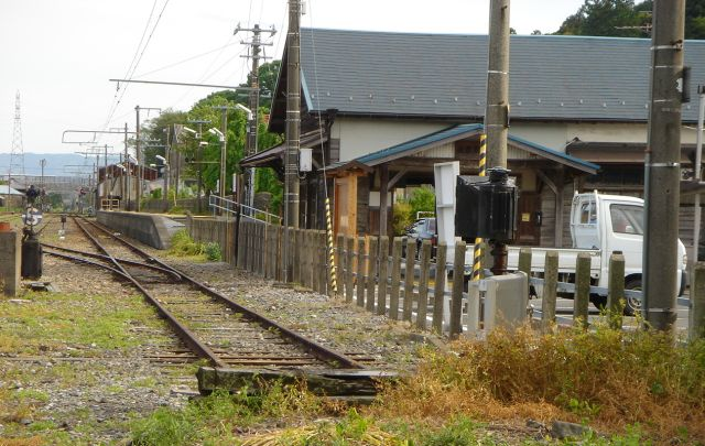 美濃赤坂駅（岐阜県、JR東海） 撮影：投稿者(Monami)、撮影日：2005年